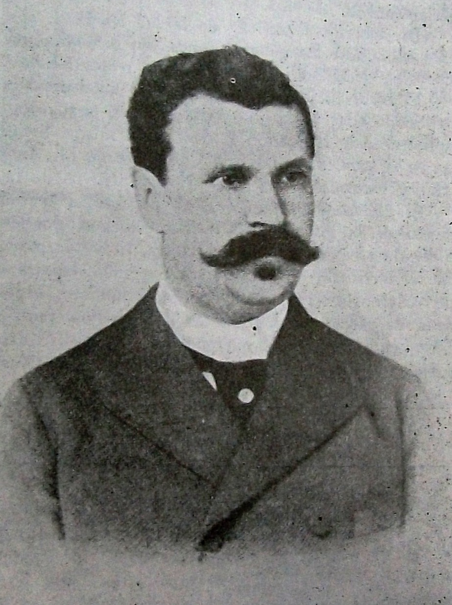 Ramón Lista